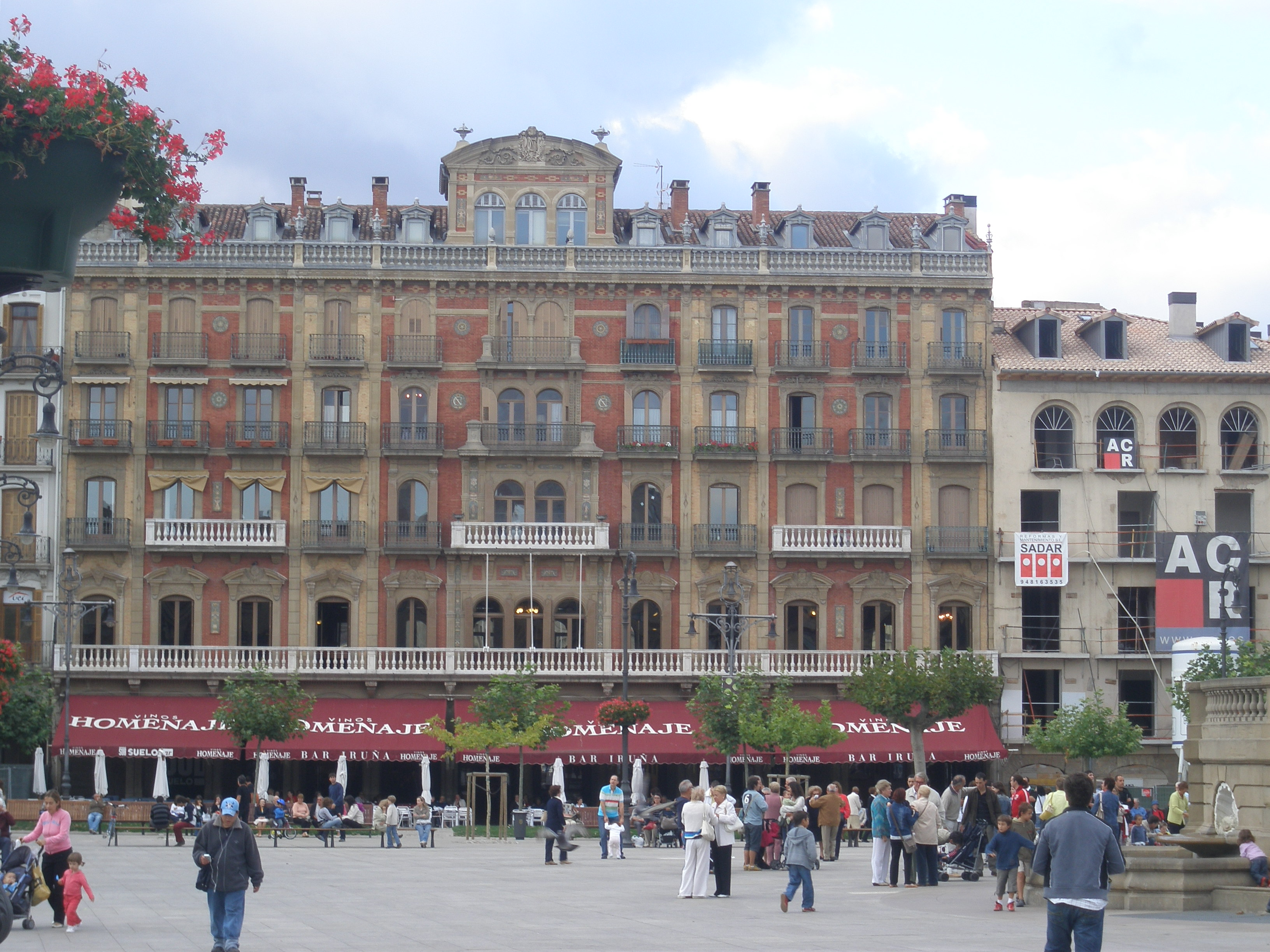 Nuevo Casino de Pamplona, y Café Iruña. Desde 1888